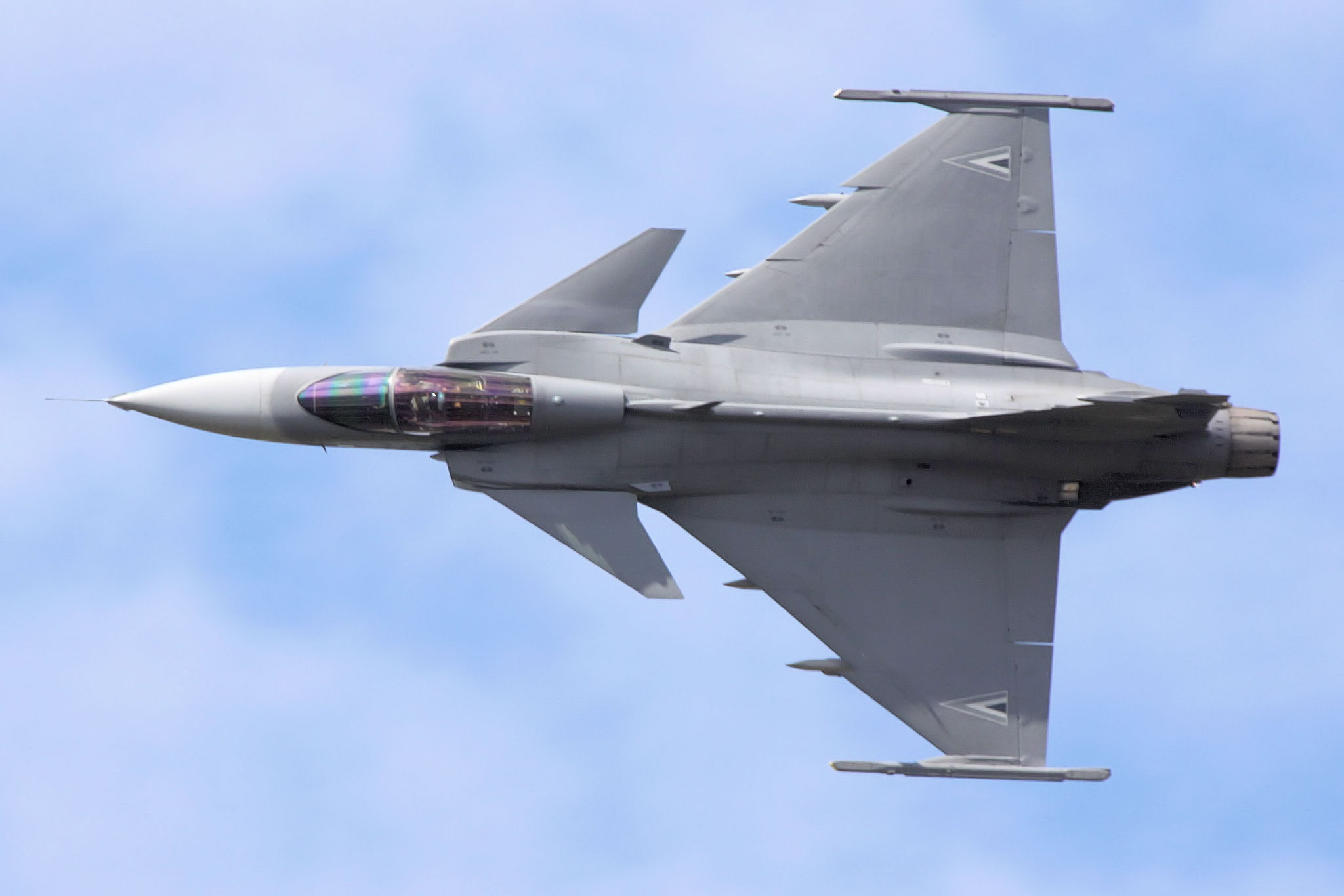 Gripen - RIAT 2009